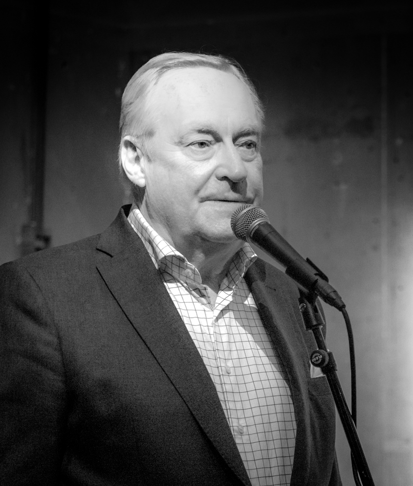 Sture Carlsson i samband med invigningen av utställningen Witnesses på Kulturhuset Stadsteatern i Stockholm den 18 oktober 2018.